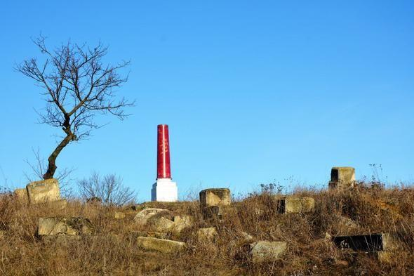 Могила подпольщиц Фаины Шполянской и Евгении Жигалиной, 1920, Еврейское кладбище, Симферополь Культурное наследие народов РФ, 911710892820005К